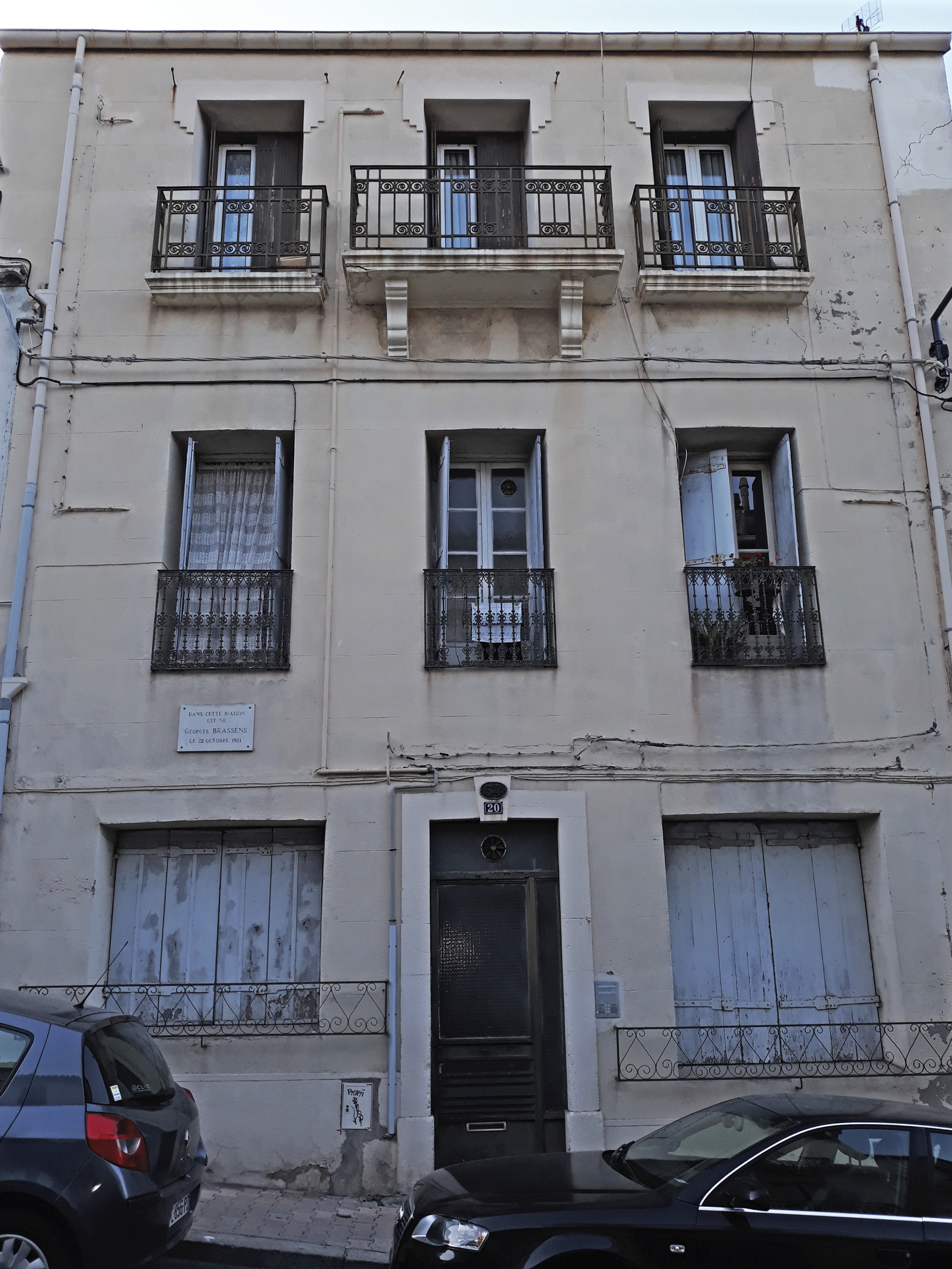 Das Geburtshaus des französischen Chansonniers Georges Brassens in Sète (Hérault).